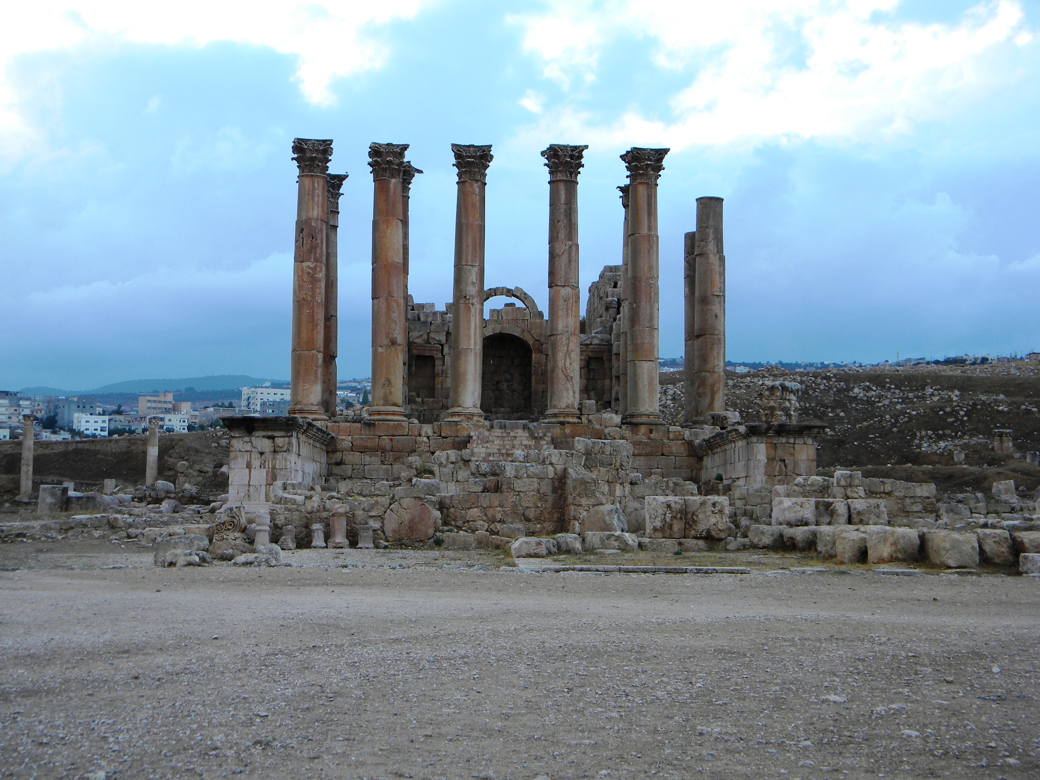 تبين الصورة معبد أرتميس الذي يعتبر معبد الالهة الحارسة للمدينة الذي اقيم في القرن الثاني للميلاد، وهو من أفخر معالم جرش التاريخية في الأردن Jordan, Jerash Temple of Artemis. The sanctuary was sacred to the city's patron deity, and it was the most important place of worship in Jerash (Gerasa). This is reflected in its enormous proportions and in the complexity of its architectural features. It was built during the 2nd century AD.